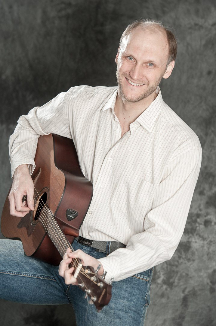 Башҡортса: Тимур Ғарипов, Урыҫ драма театры артисы (Өфө)